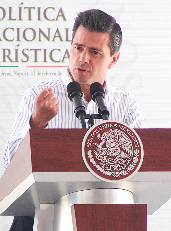 Acompaña el Gobernador Electo de Jalisco, Jorge Aristóteles Sandoval, al Presidente de México, Enrique Peña Nieto en su visita a Bahía de Banderas